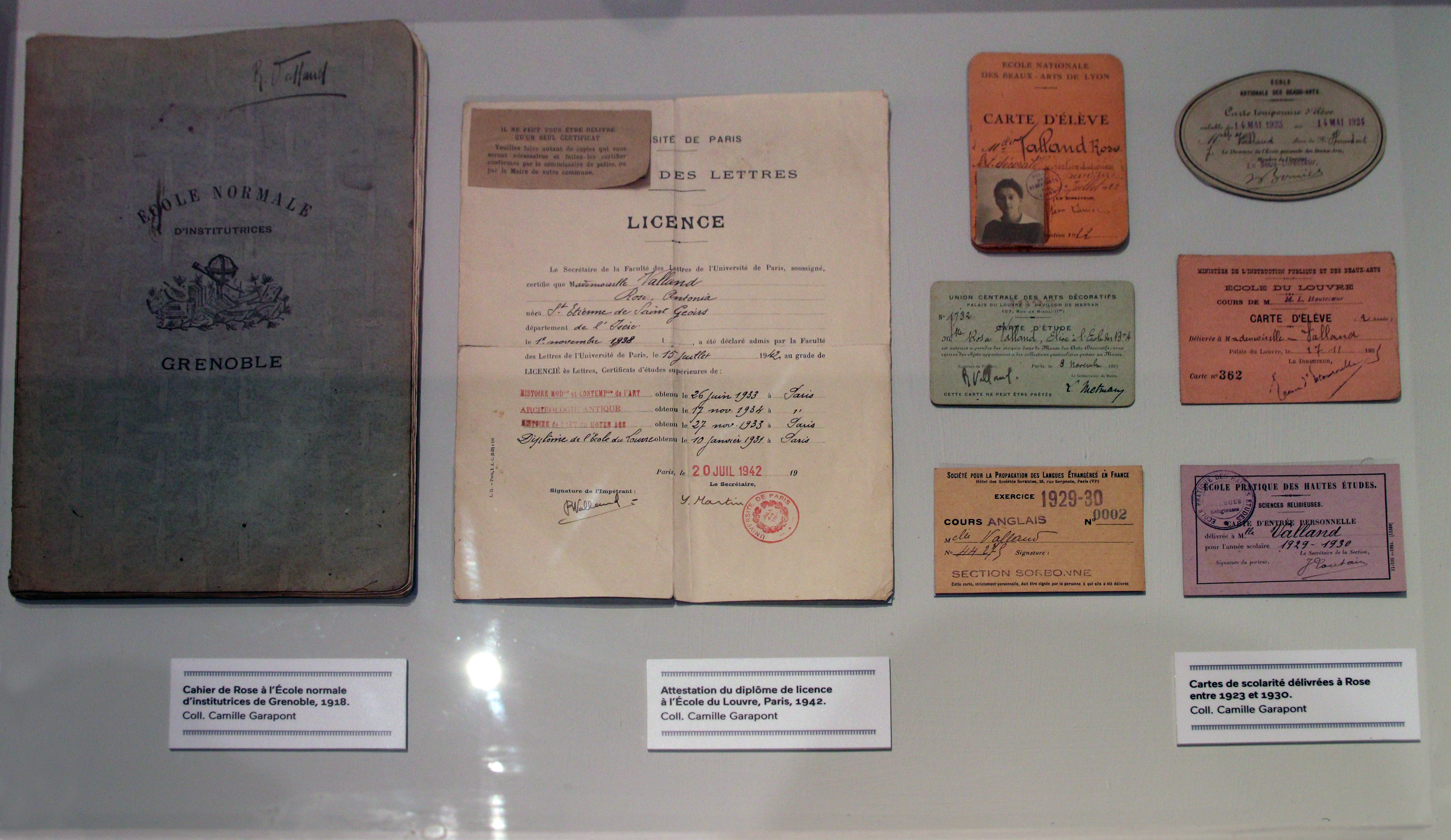 exposition temporaire "Rose Valland. En quête de l'art spolié" (novembre 2019 à avril 2020) au Musée dauphinois, Grenoble.